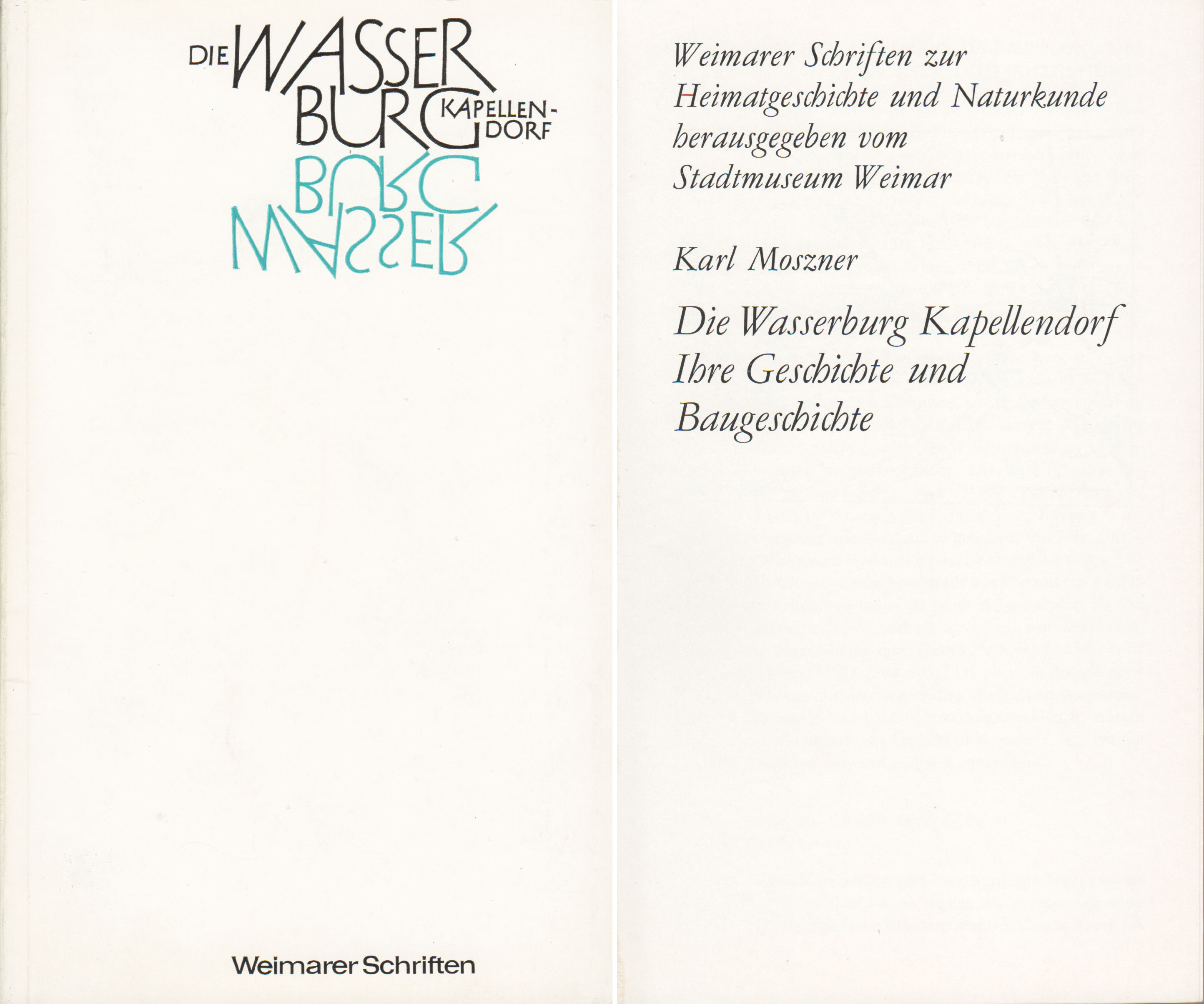 Titelseiten des Weimarer Heftes Die Wasserburg Kapellendorf Ihre Geschichte und Baugeschichte von Karl Moszner (1977)